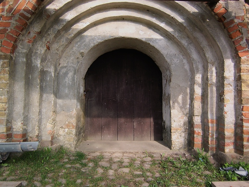 Kirchenportal in Dänschenburg